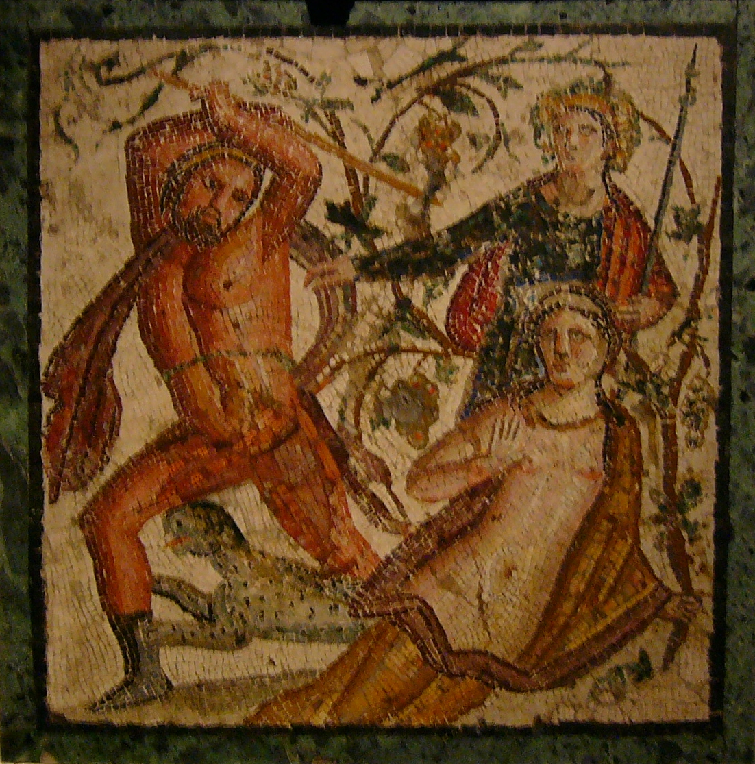 Licurgo e Ambrosia è un mosaico (cm 40 x 40) rinvenuto ad Ercolano, oggi a Napoli nel Museo Archeologico Nazionale (inv. nr. 9988). Ritrae il re di Tracia, Licurgo, nemico di Dioniso, che assale la ninfa Ambrosia, la quale trasformandosi in vite, con i suoi tralci legherà Licurgo per consegnarlo alla vendetta di Dioniso.